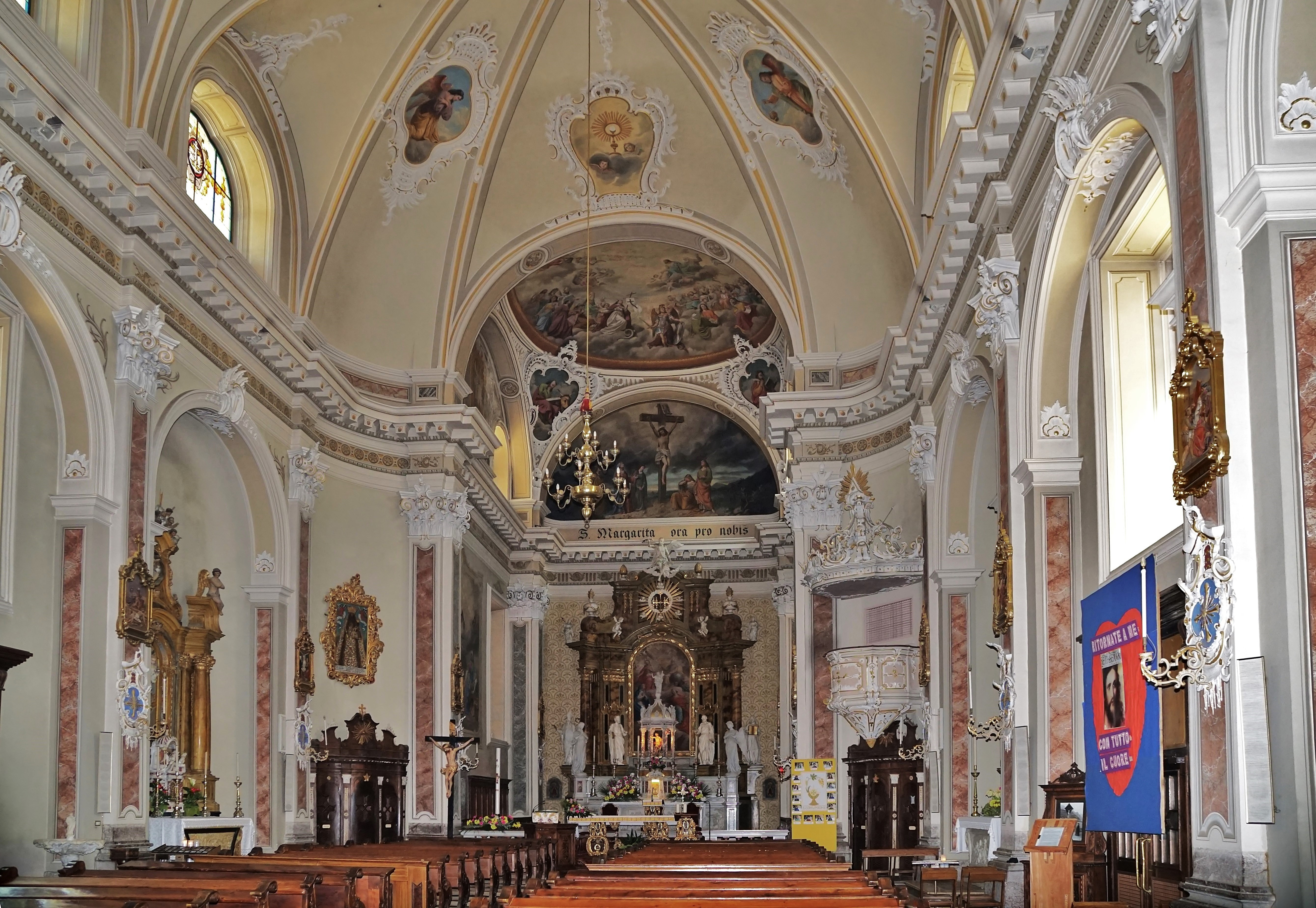 Innenansicht der Kirche St. Margareta in Sappada (Italien)